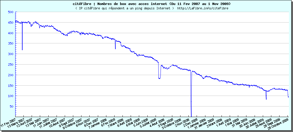 Courbe des abonnés citéFibre